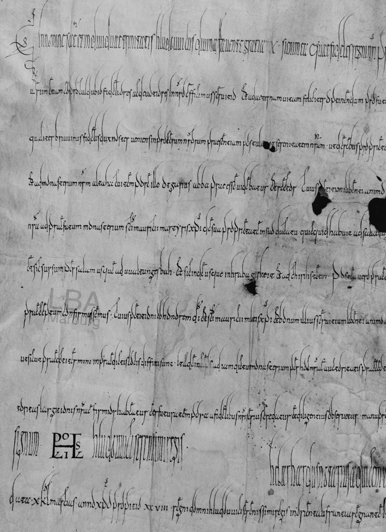 Urkunde König Ludwigs des Deutschen: Der König bestätigt dem Kloster Niederaltaich, die von Fürst Pribina geschenkten Besitzungen in Zalabér.